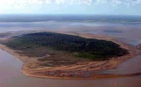 Reserva Biológica do Parazinho